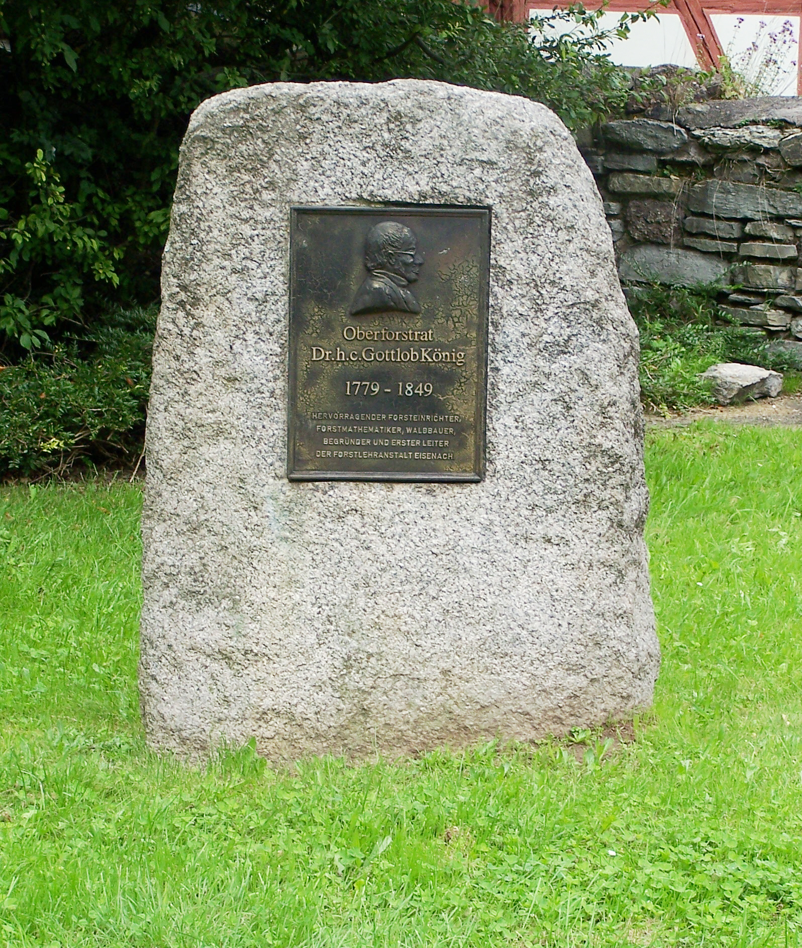 Gedenkstein für Oberforstrat König auf dem Eisenacher Alten Friedhof.